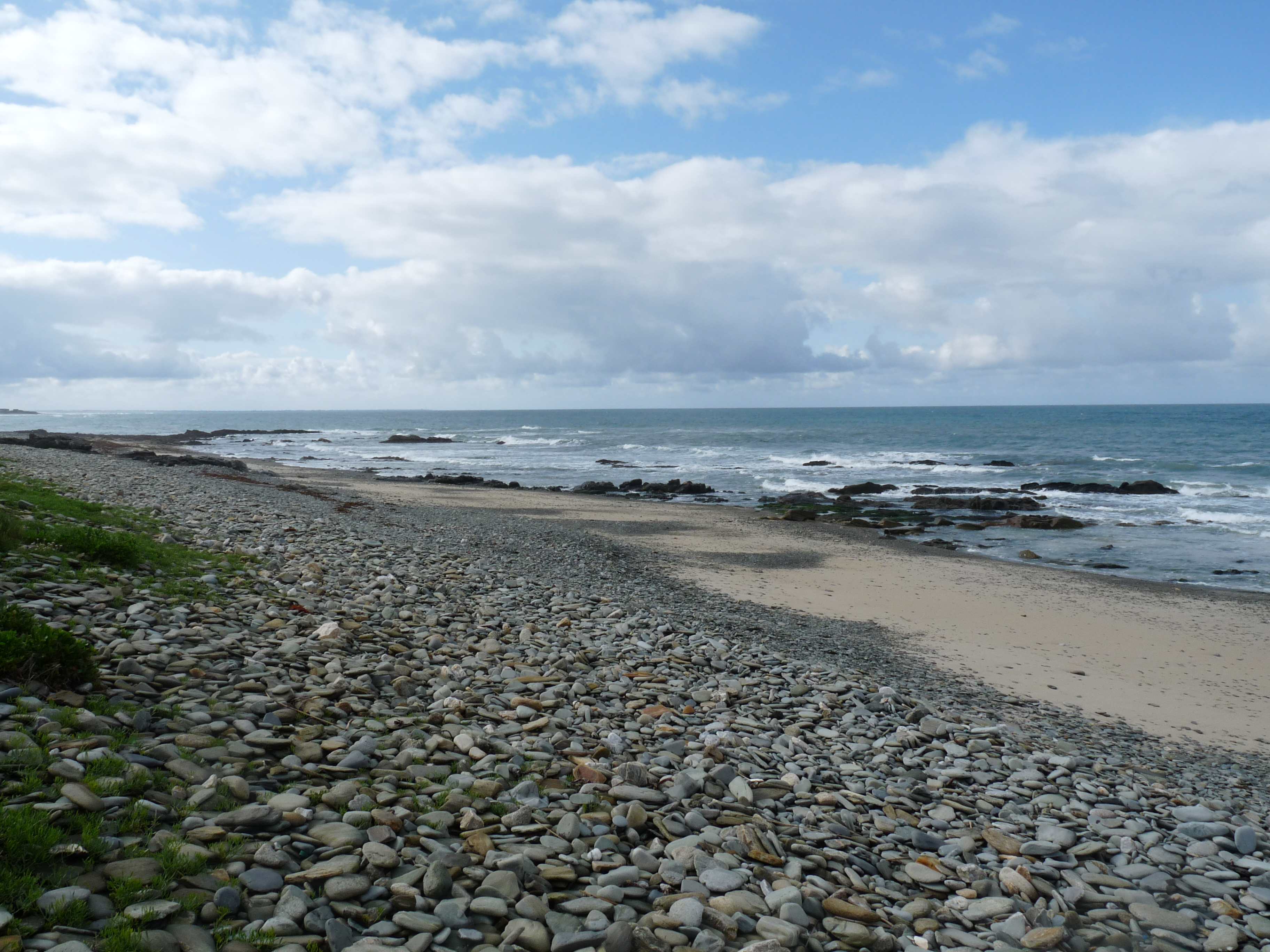 Galets dans la baie d'Audierne entre Plouhinec et Plozévet (Finistère)